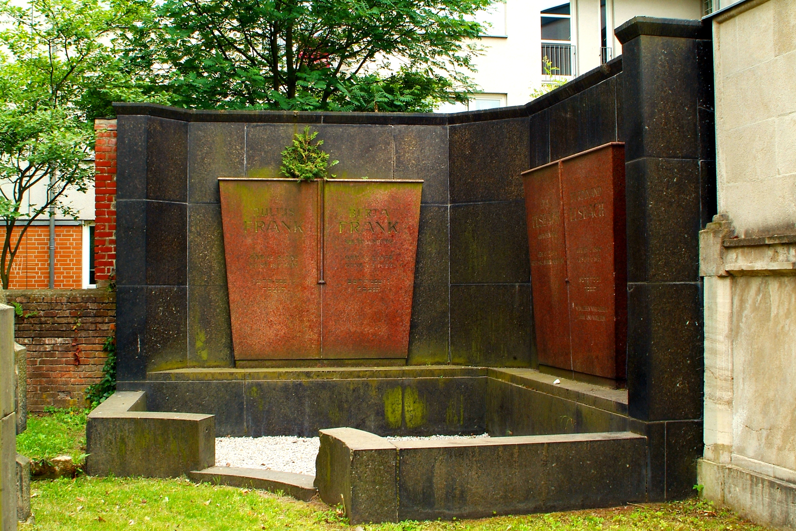 Das Grabmal der Familien von Ferdinand Elsbach und Julius Frank auf dem Jüdischen Friedhof An der Strangriede wurde von dem Architekten Wilhelm Mackensen entworfen.